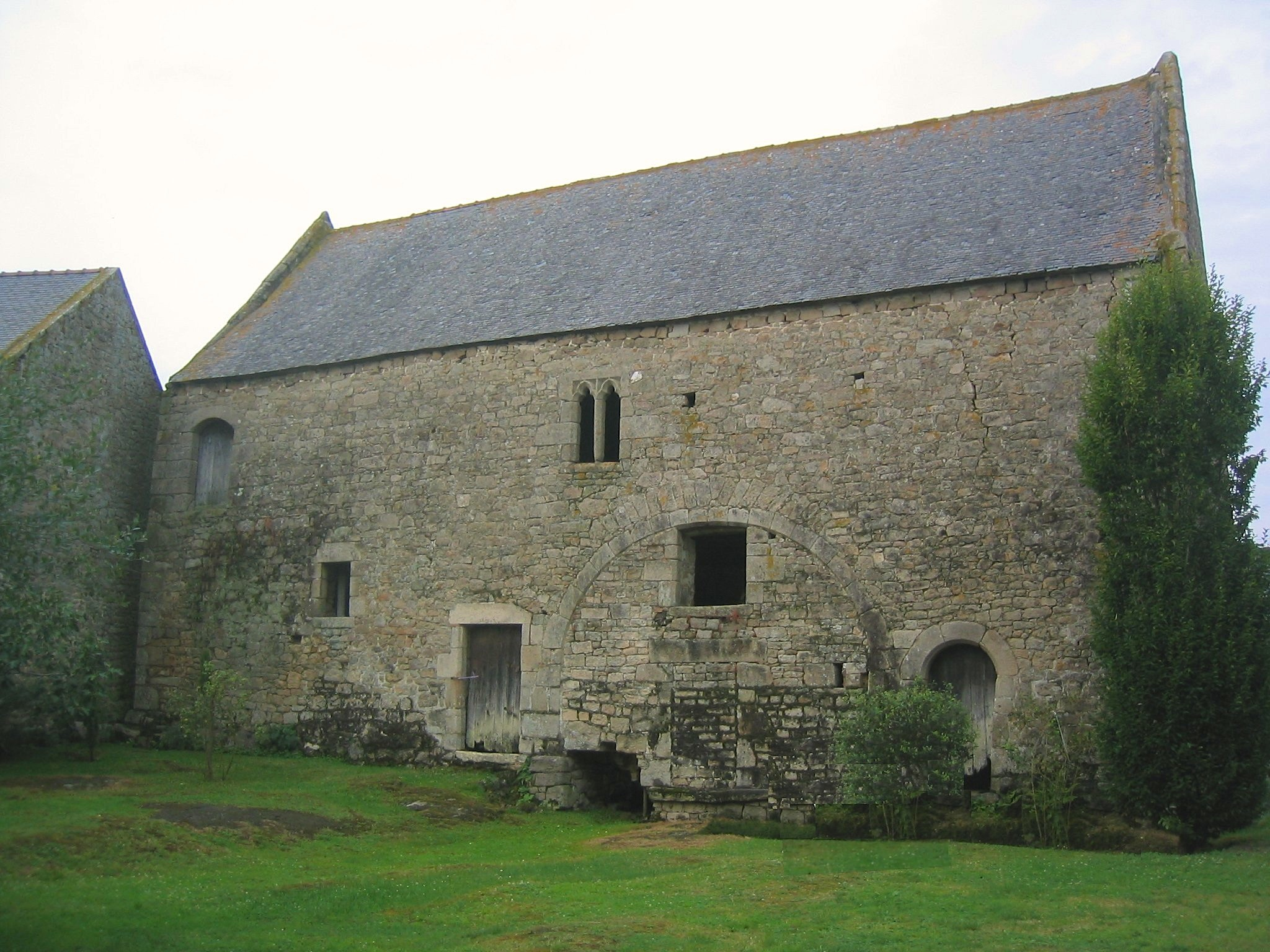 vue depuis la cour intérieure de la façade Ouest.